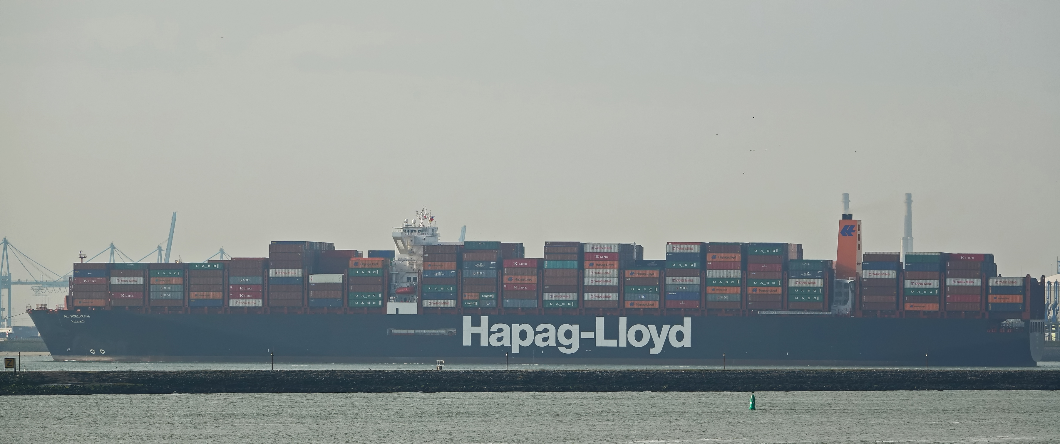 Beerkanaal Europoort 4-11-2017